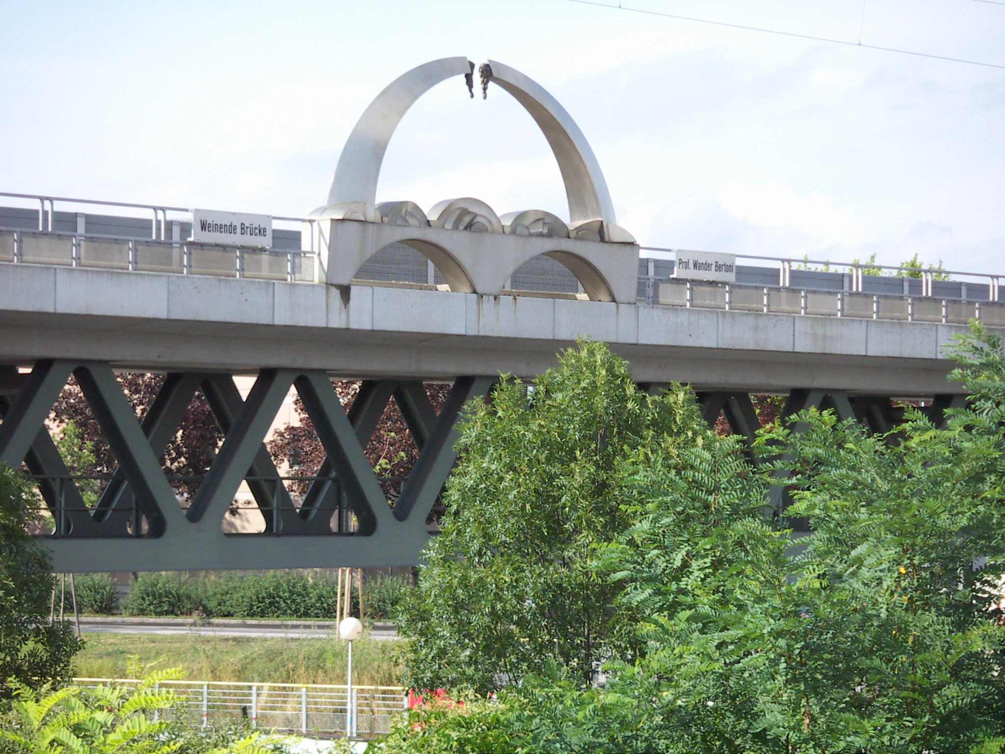 Wien, Bezirk Floridsdorf, Weinende Brücke, Kunstobjekt von Wander Bertoni